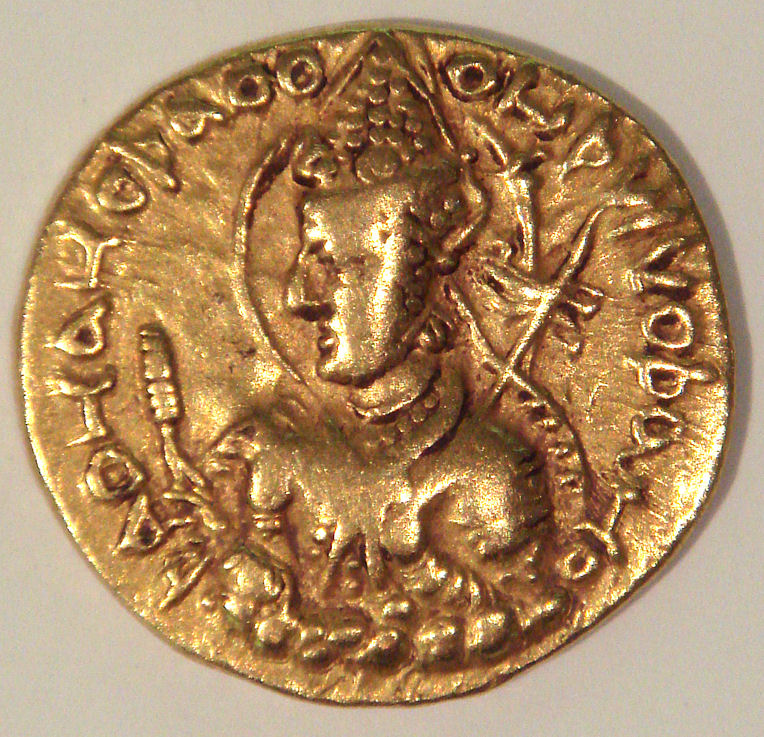 Huvishka Orient Museum Coin